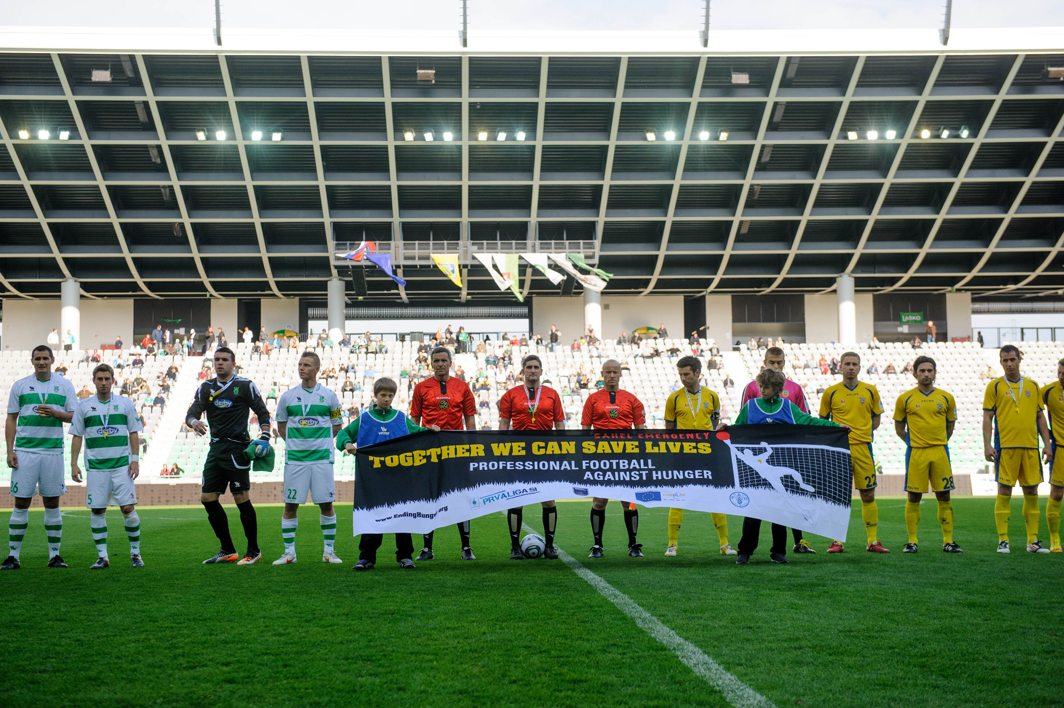 31 March 2012, Stozsice, Ljubljana, Slovenia - Olimpija during football game Olimpija - Domzale, round 27 of PrvaLiga 2011-2012.